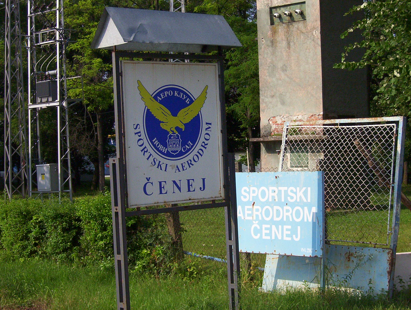 Novi Sad Airport